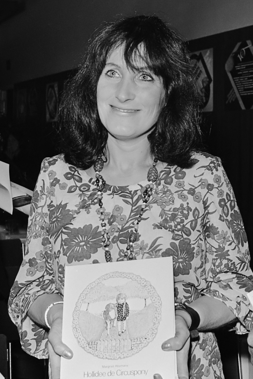 Winnaars Gouden Griffel en Gouden Penseel bekend gemaakt persconferentie i.v.m. kinderboekenweek, v.l.n.r. Jan Terlouw , Margriet Heymans , Henk Barnard 1 oktober 1973